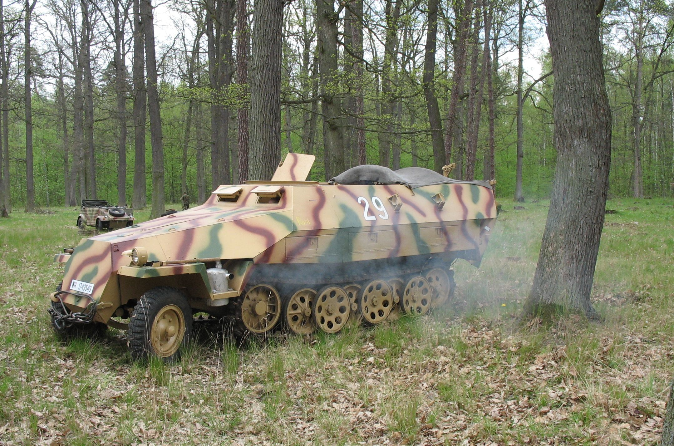 SdKfz 251 "Rosi"